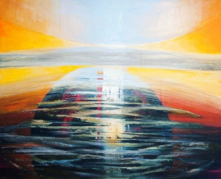 LÉG ÉS FÖLD (120x140 cm. olaj, vászon) Létünk két nagy meghatározó eleme a tiszta levegő és a szennyezetlen Föld. A két elemben és találkozásán él az ember. Szinte végetlenül fogja körül és határozza meg az ember helyét. Arányaiban már-már eltűnik, amit az emberi kéz létrehozott – város vagy falu. A széles horizont, a nagytömegű lég és még szinte érintetlen Föld között plasztikusan fogalmazott emberi település meggyőz bennünket a kép színéről.